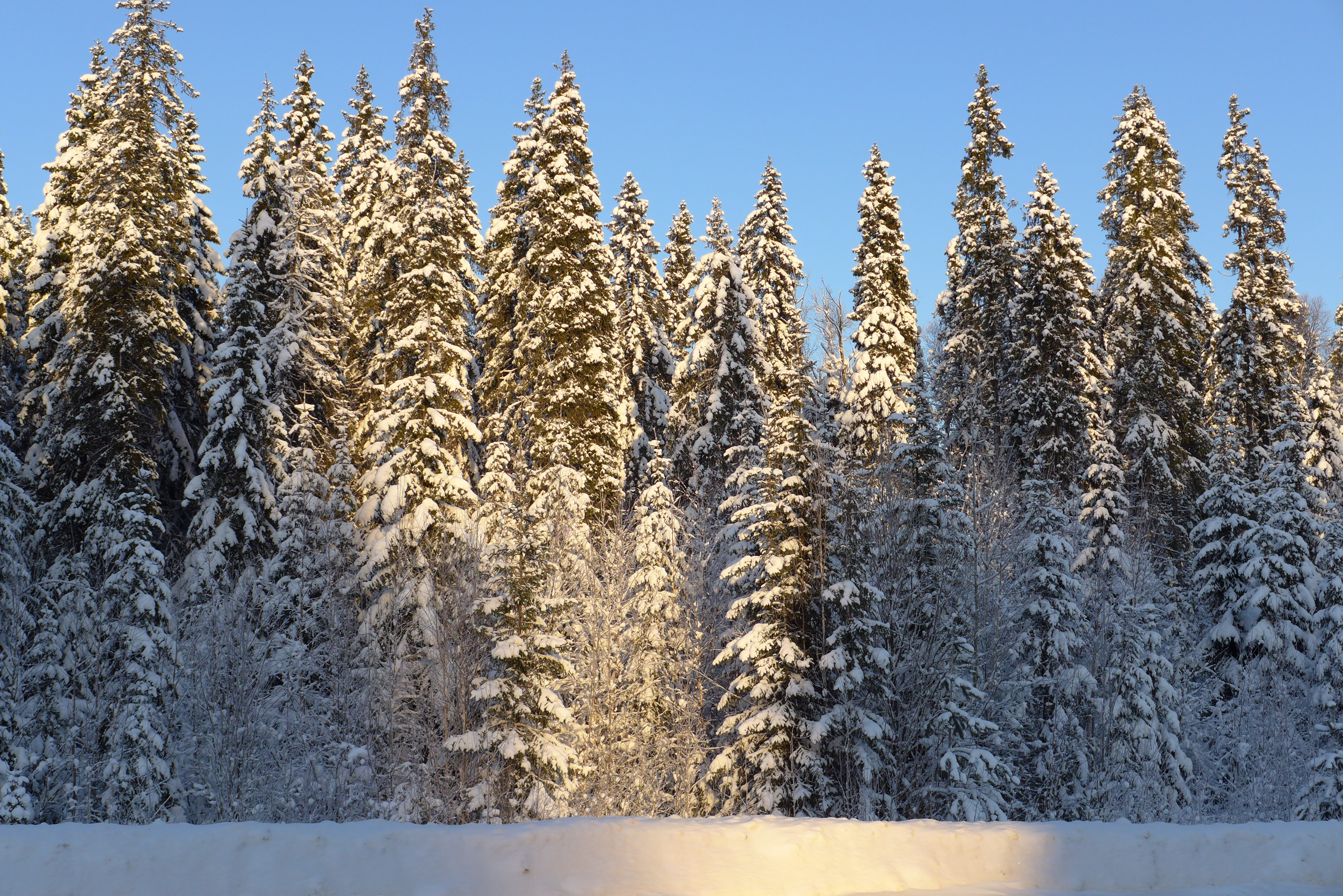 Тайга